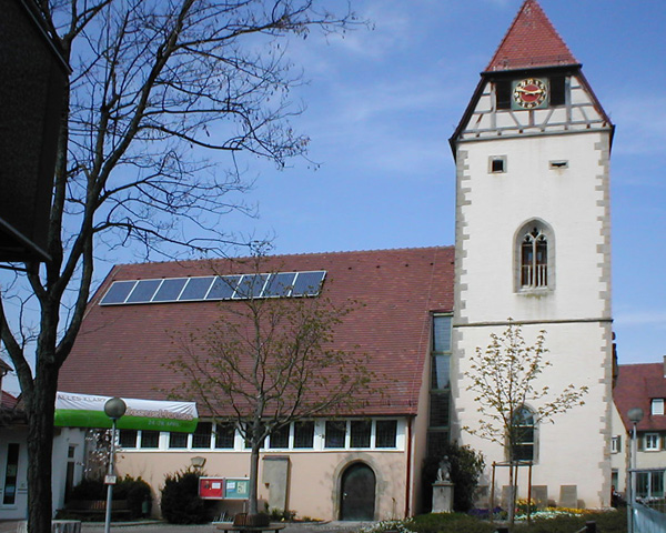 Kirche St. Georg in Hausen an der Zaber, Ortsteil von Brackenheim